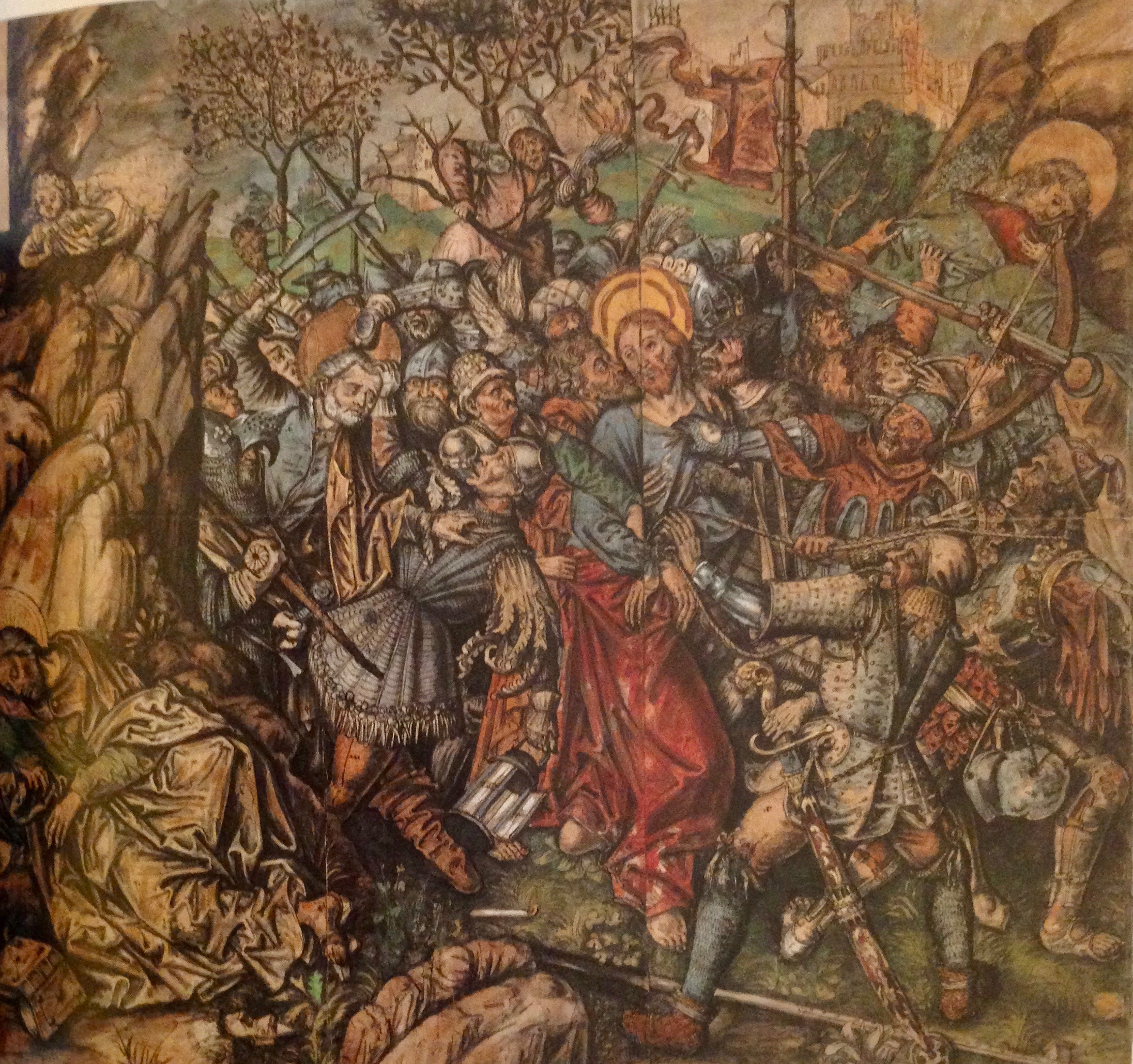 Copie par Dietterlin en 1621d'un panneau du Maître de la Pasion de Karlsruhe